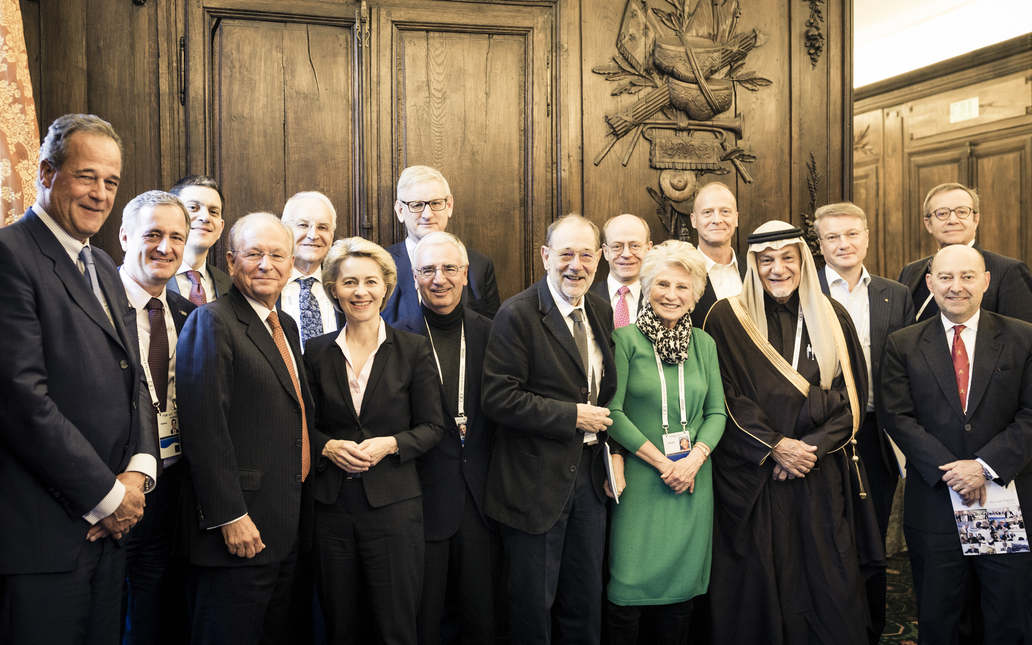 MSC Advisory Council während der Münchner Sicherheitskonferenz 2017